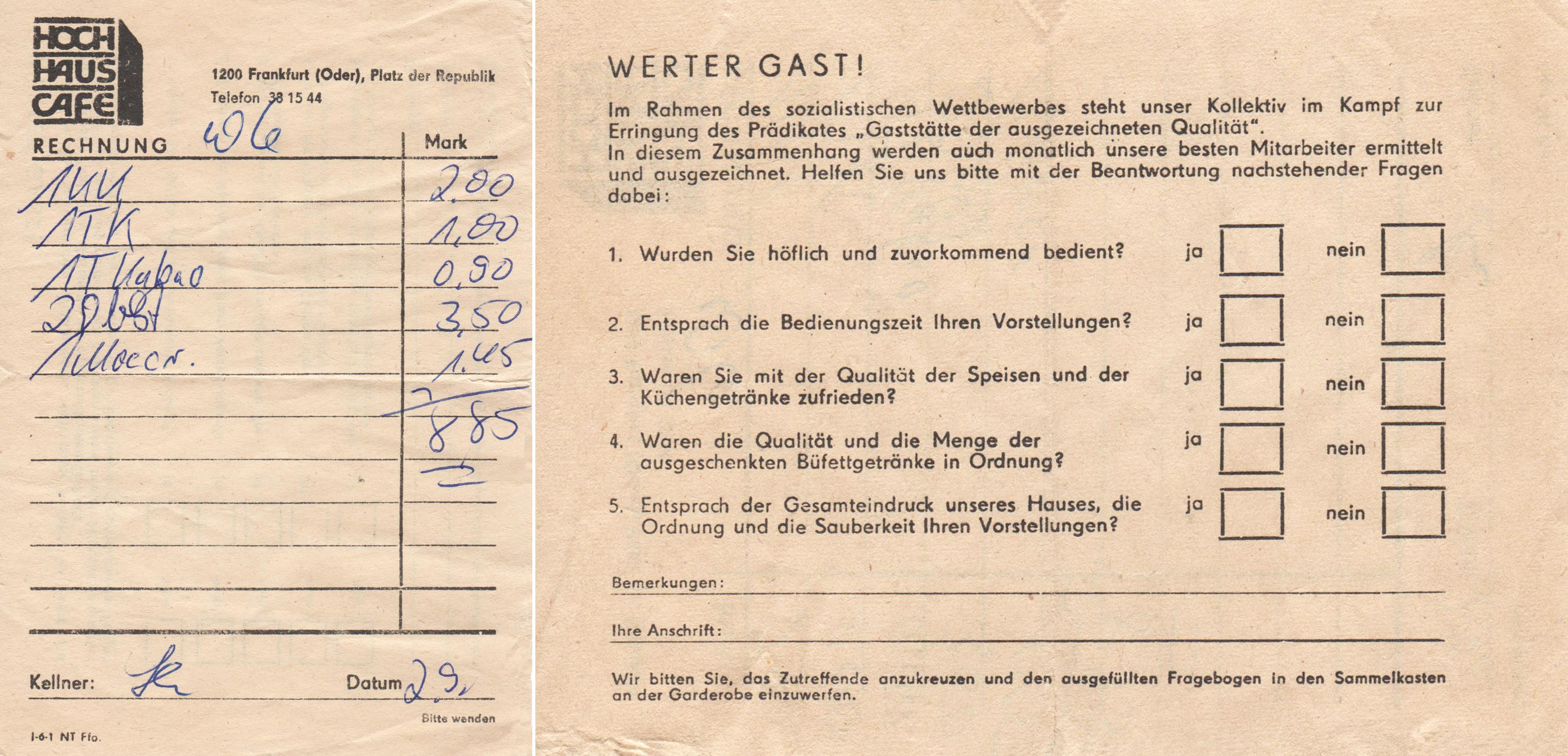 Frankfurt-Oder, Hochhaus-Café Rechnung und Gaststättenbewertung auf Rückseite